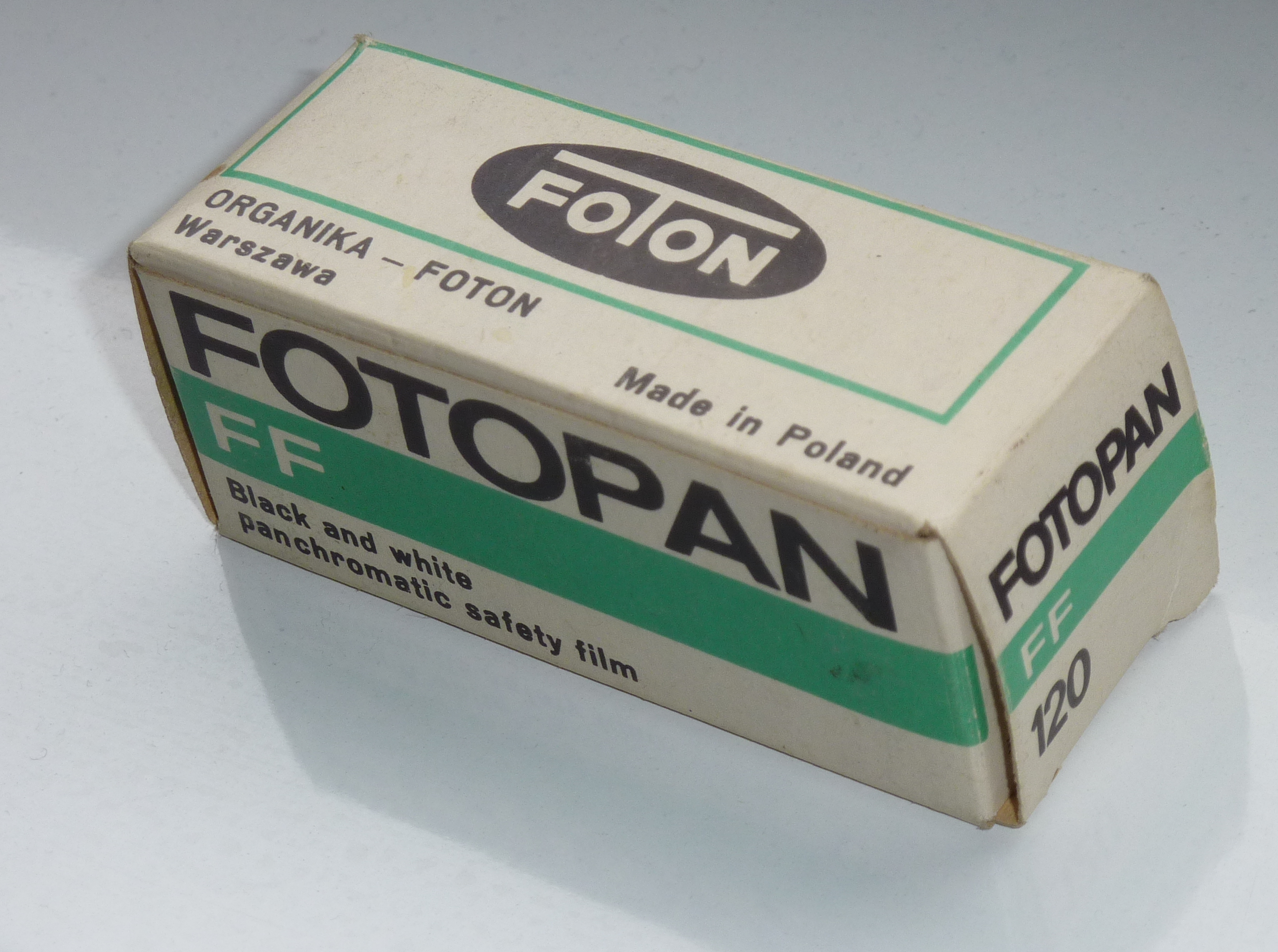 Pudełko film Fotopanu FF/120 z roku 1978